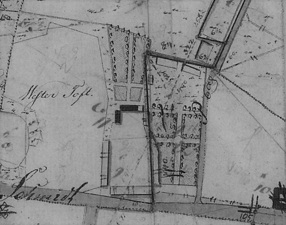 Grundplan ca. 1790 Frøstrup Hovedgård